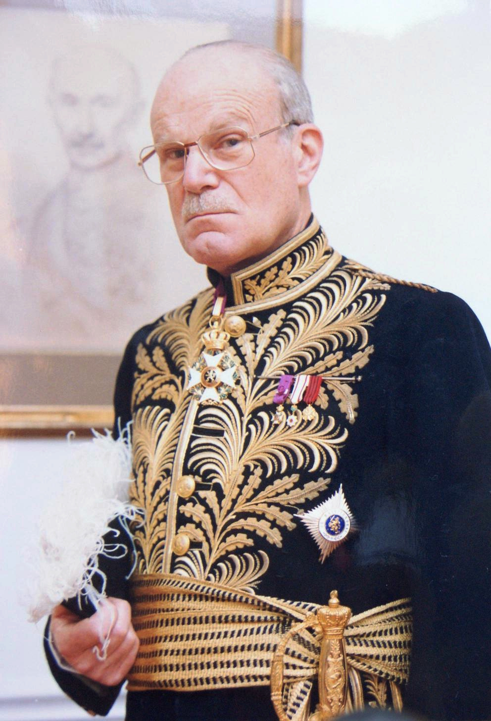 Photo Baron Henri Beyens 3